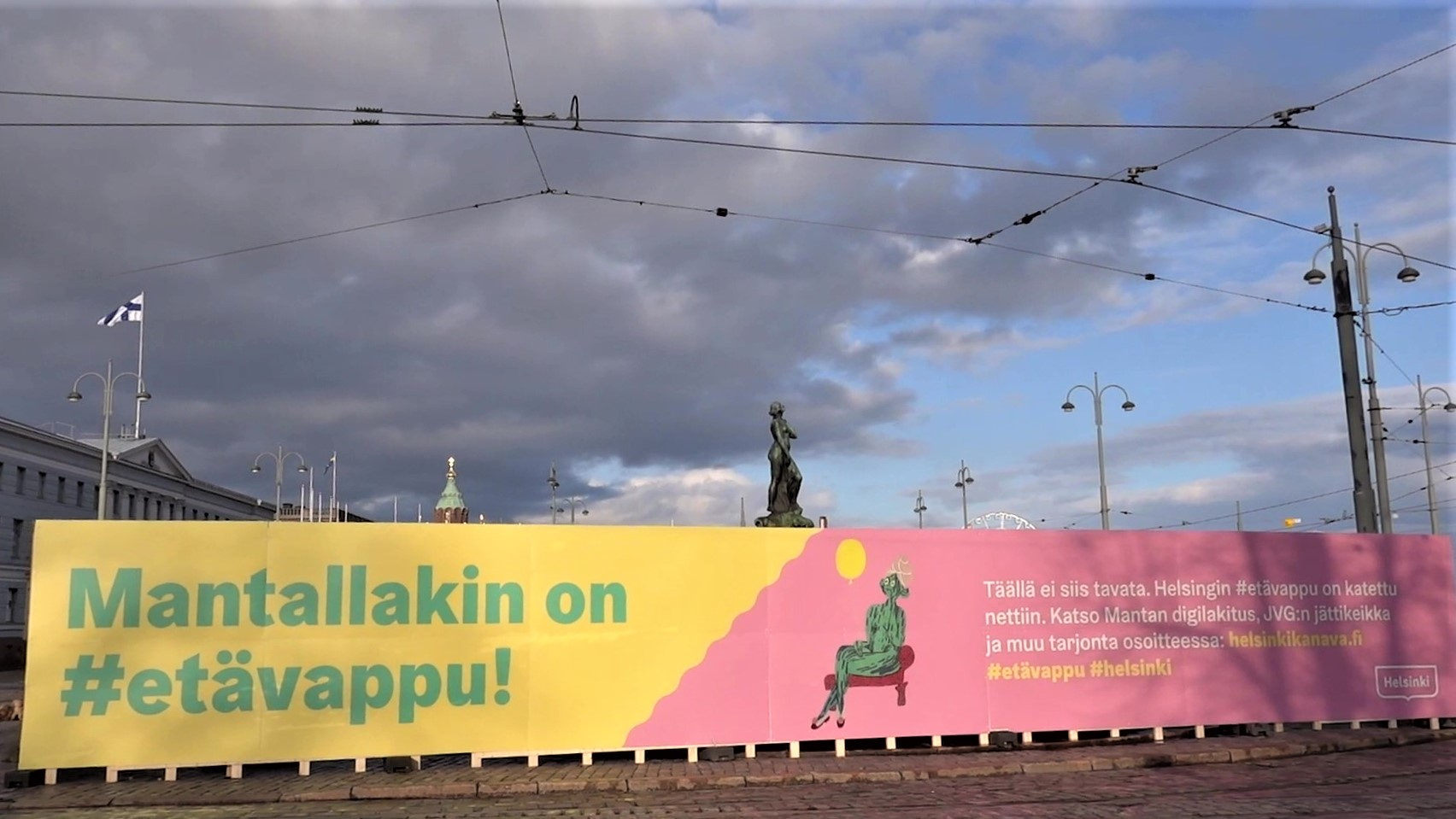 Näkymä Helsingin Kauppatorille, Havis Amanda ja sen suoja-aita 29.4.2020